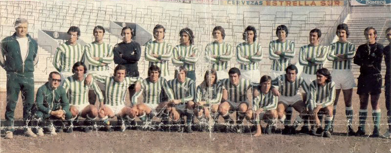 Manolo Díaz en el Betis